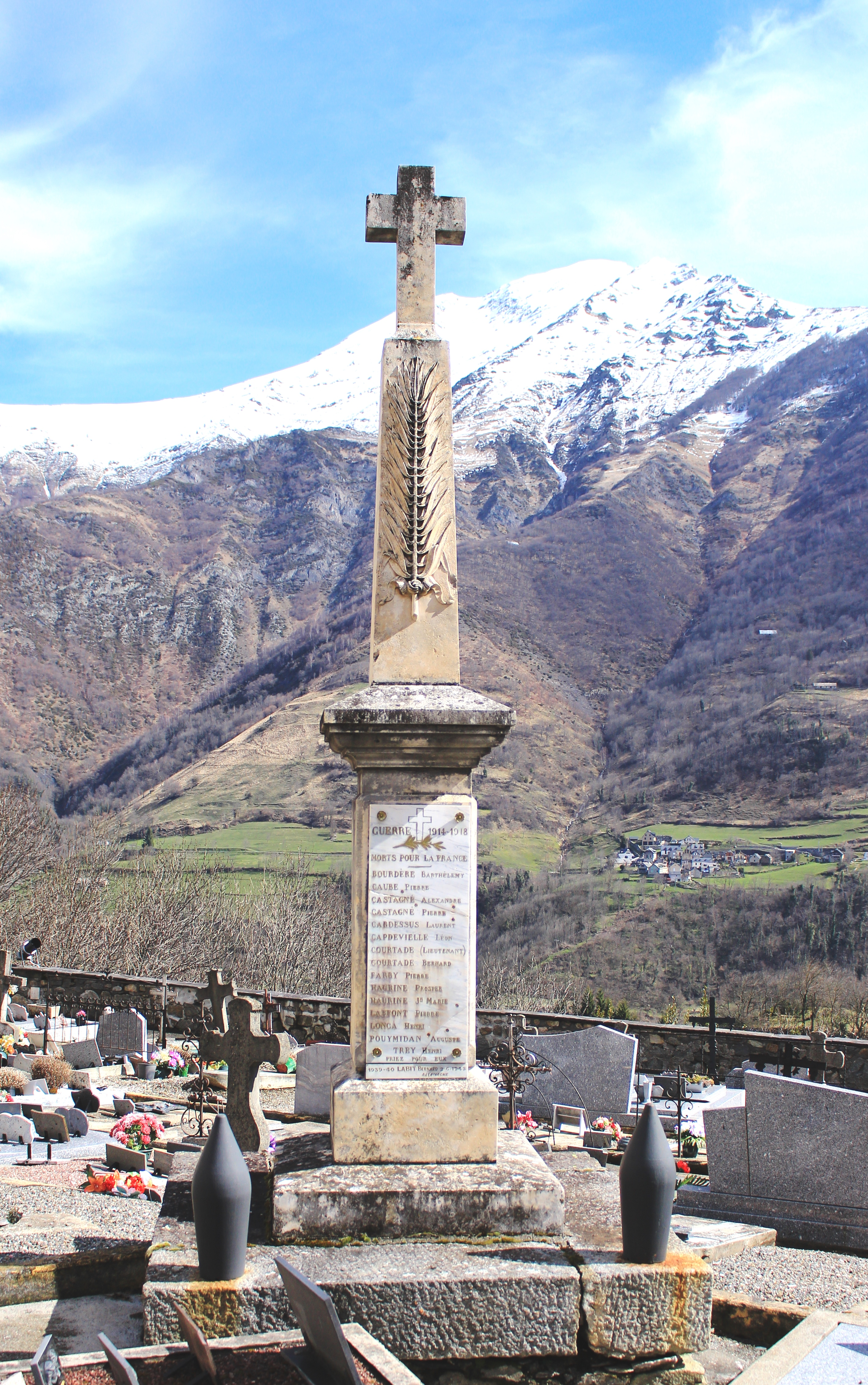 Monument aux morts de Sazos (Hautes-Pyrénées)